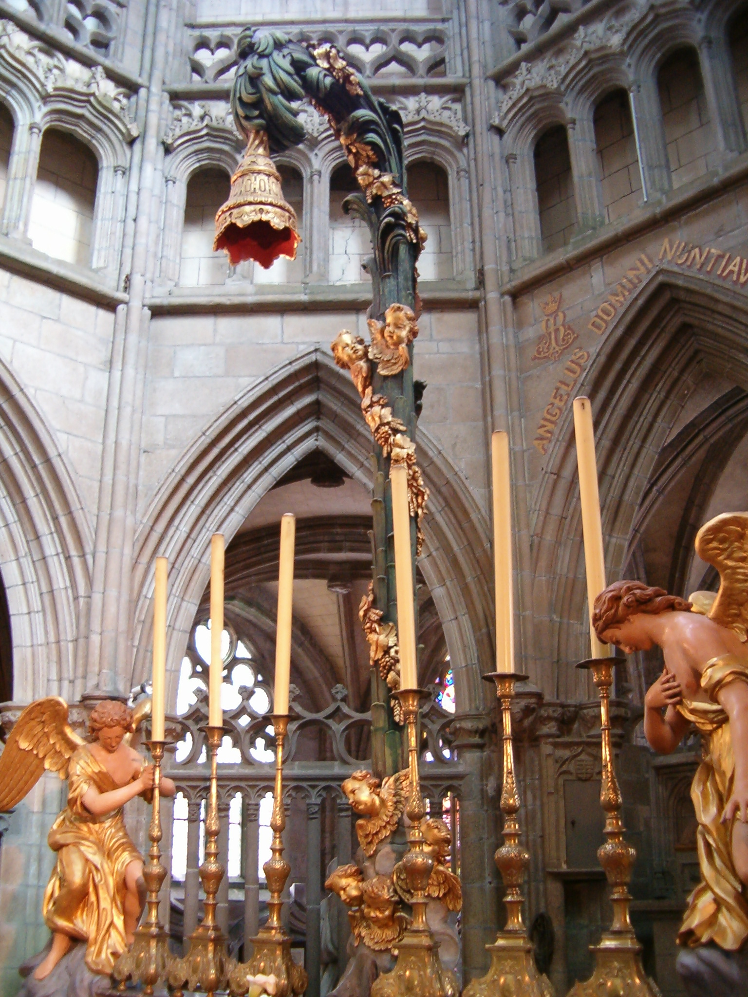 Ciborium de la cathédrale de Saint-Pol-de-Léon